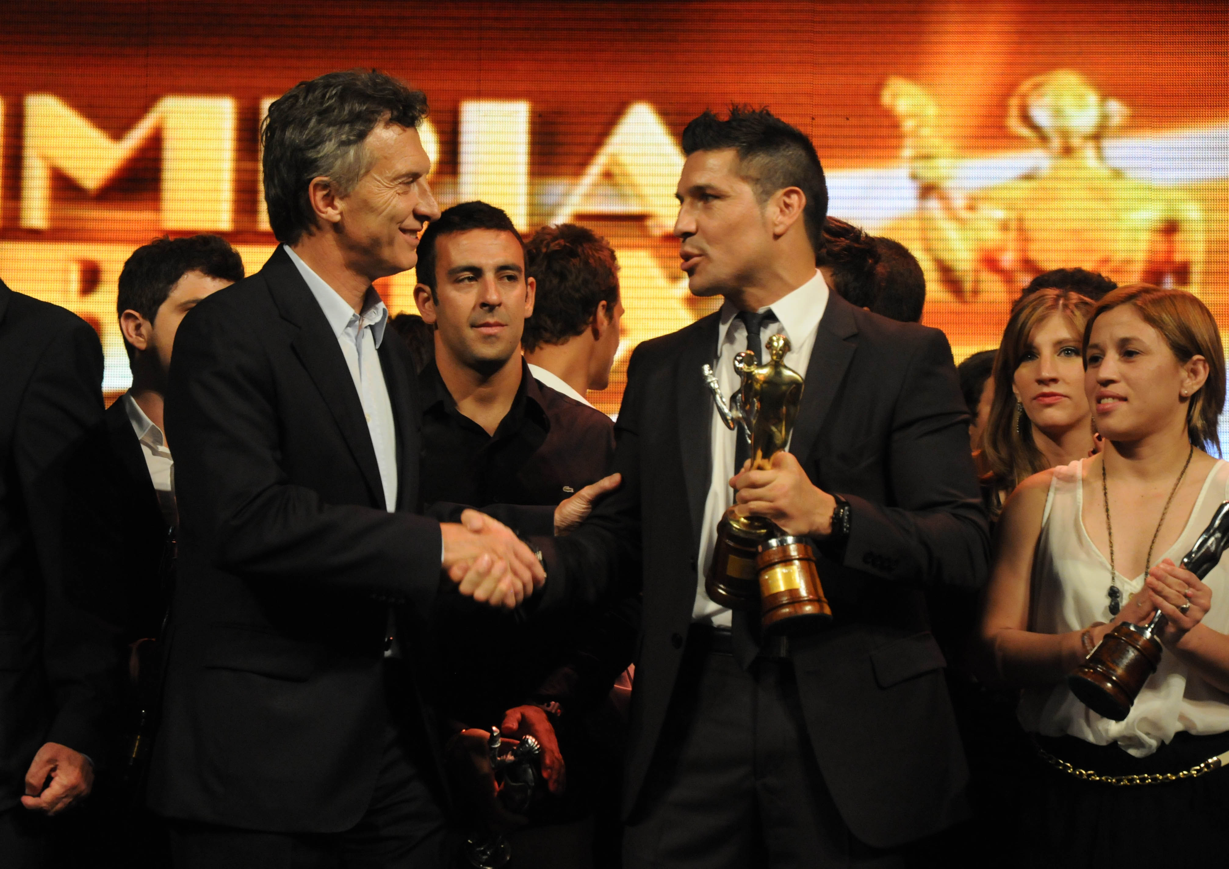 Buenos Aires, 19 de Diciembre de 2012. El jefe de Gobierno de la Ciudad de Buenos Aires, Mauricio Macri, entregó anoche el tradicional premio Olimpia de Oro al mejor deportista del año que este temporada resultó ser el boxeador Sergio "Maravilla" Martínez.